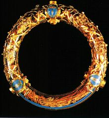 بقايا تاج الشوك اشتراه لويس التاسع من بالدوين الثاني وتم حفظه في نوتردام دي باريس حتى 15 أبريل 2019 ، عندما تم إنقاذه من حريق في الكاتدرائية.